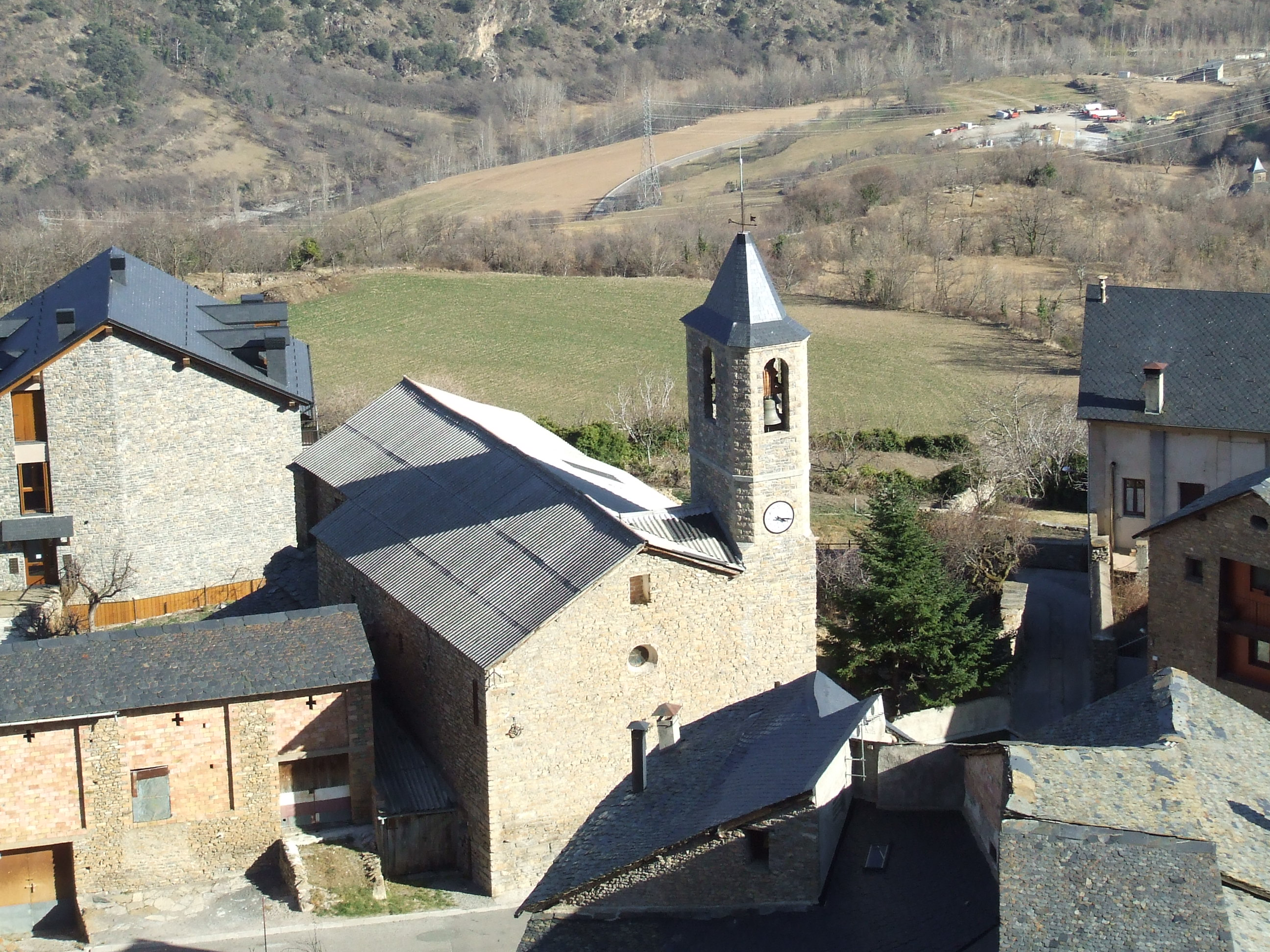 La Mare de Déu de la Candelera d'Olp (Enviny, Sort, Pallars Sobirà)